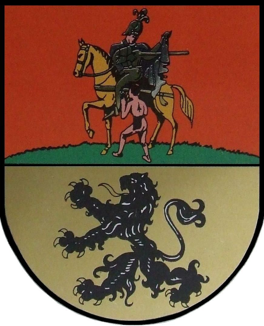 Wapen van de voormalige gemeente Tegelen